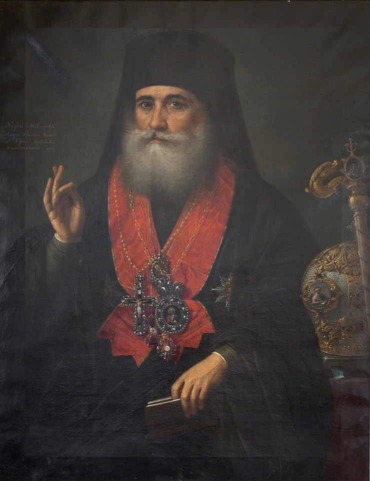 Portretul Mitropolitului Nifon – ulei pe pânză, 102x76,3 cm, lucrare semnată și datată în stânga, jos, cu roșu Tattarescu 1862, iar în stânga, central, poartă inscripția - Nifon Mitropolitul Ungro – Valahie Român II – Eforul Spitalului Brâncovenescu 1869. Mitropolitul Nifon a fost cel care, în ziua de 29 aprilie 1856, a ținut slujba de căsătorie a lui Gheorghe Tattarescu cu Maria Ioanidi. Mitropolitul Nifon l-a recomandat pe Tattarescu familiei Oteteleșanu pentru pictarea capelei bisericii de la Măgurele, lucrarea aceasta fiind prima de acest fel de la întoarcerea artistului de la studii din Italia. Nifon i-a mai facilitat zugrăvirea Bisericii Zlătari, din București (1853) și a Cetățuia, lângă Râmnicu Vâlcea (1854). Portretul lui Nifon a participat, alături de alte picturi ale pictorului, la expoziția din București a Societății Amicilor Bellelor Arte din anul 1873.